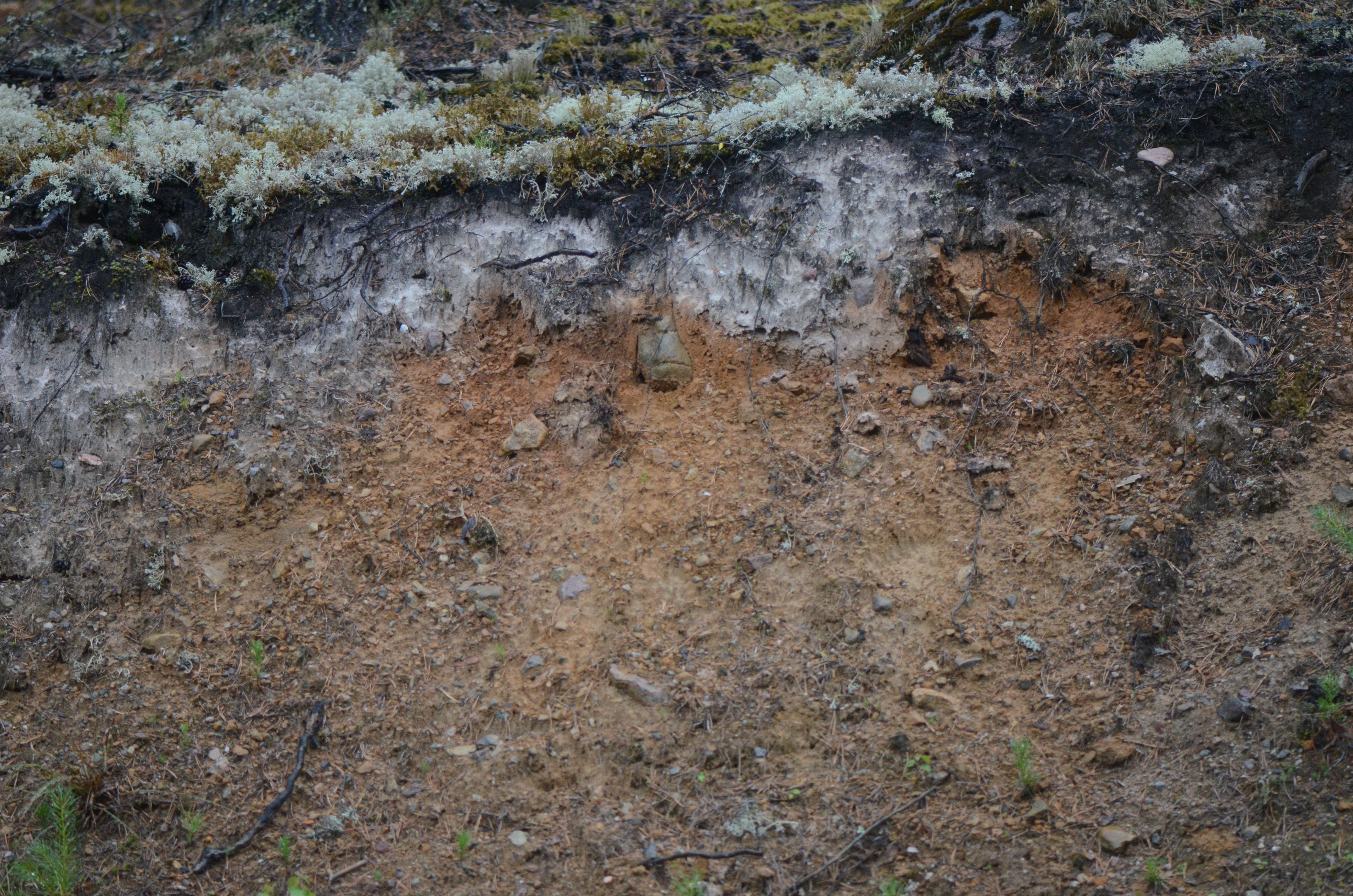 Podsolprofil i veiskjæring. Legg merke til den svarte humussona øverst, det hvite utvaskede laget under, mørkere rødt av jern + jernet som er felt ut fra ovenfor og slik jorden egentlig er nederst som blekrødt.